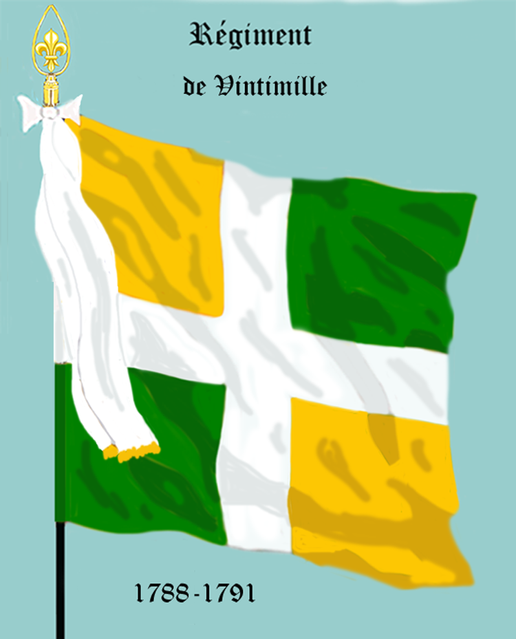 Ordonnanzfahne eines königlich französischen Infanterie-Regiments. - Entnommen und überarbeitet aus: „LES UNIFORMES ET LES DRAPEAUX DE L'ARMÉE DU ROI“ Marseille 1899. (Drapeau d'Ordonnance d' un régiment française d'infanterie royale.)